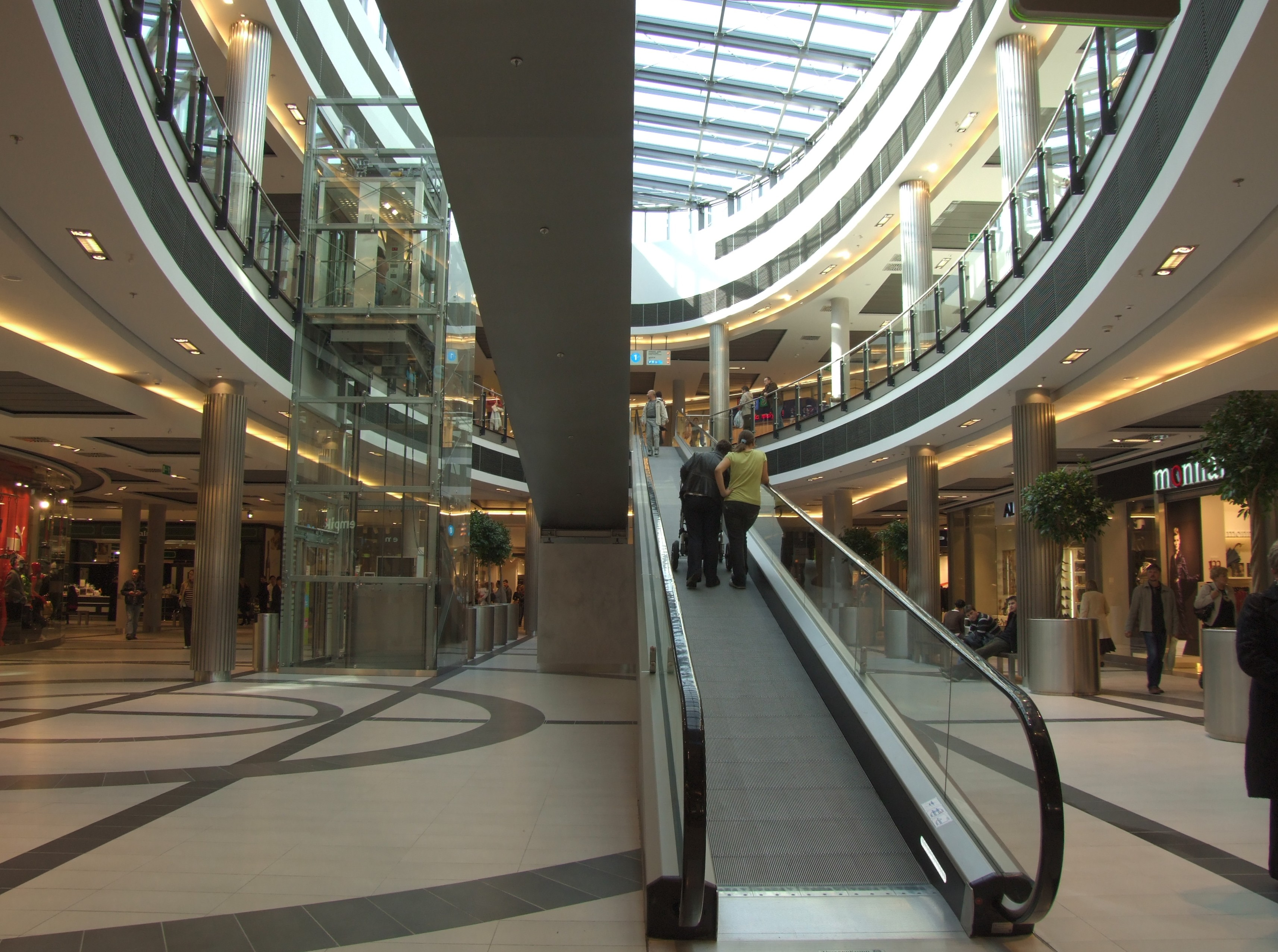 galeria handlowa focus park w Zielonej Górze